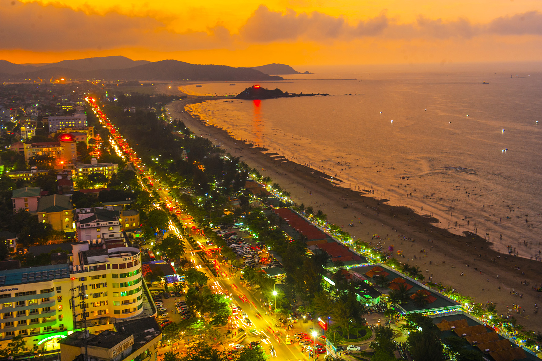 Cửa Lò về đêm 2019